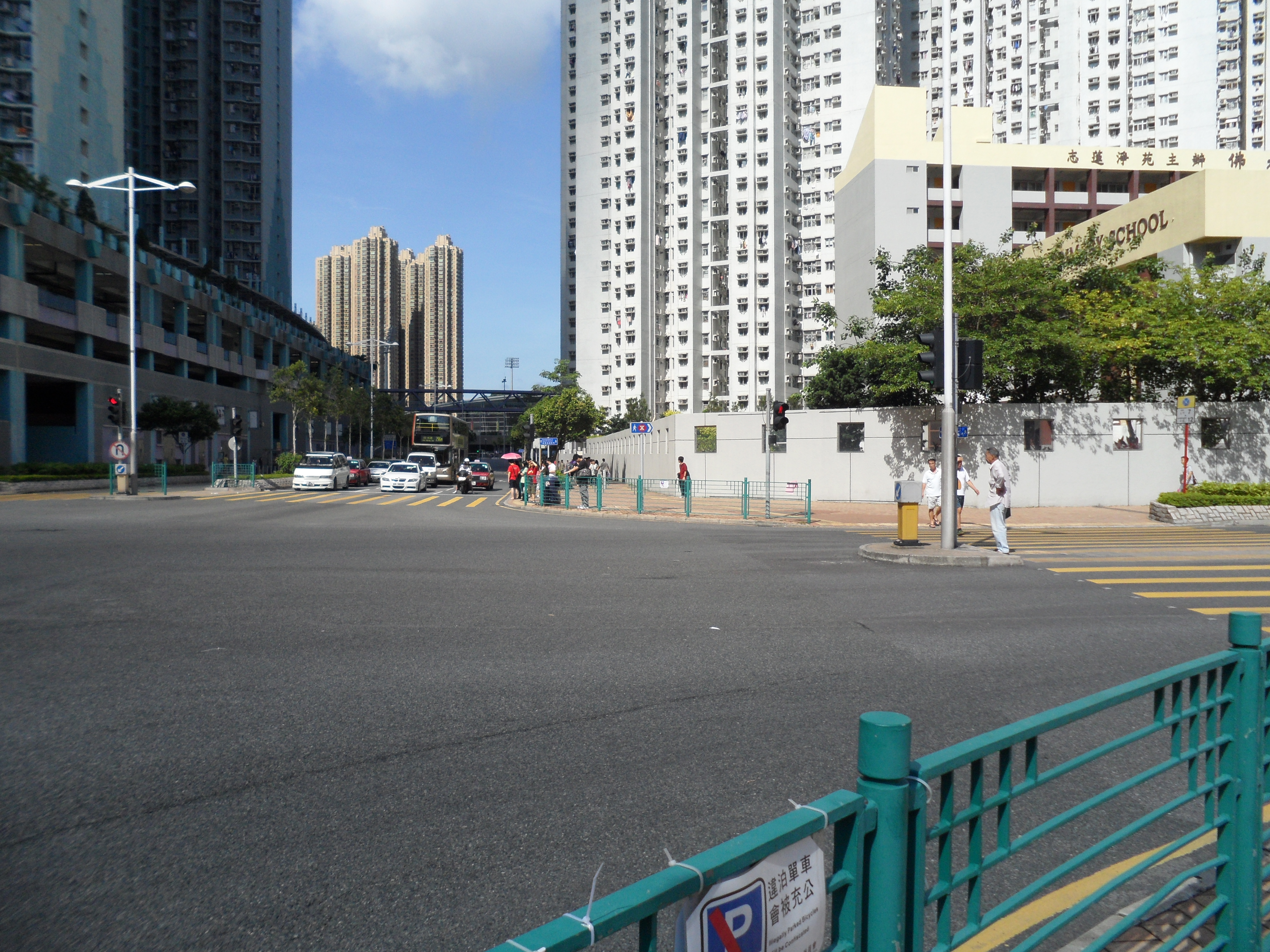 唐明街與唐俊街交界